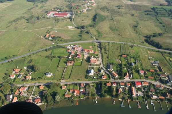 Dorotowo od strony Jeziora Wulpińskiego